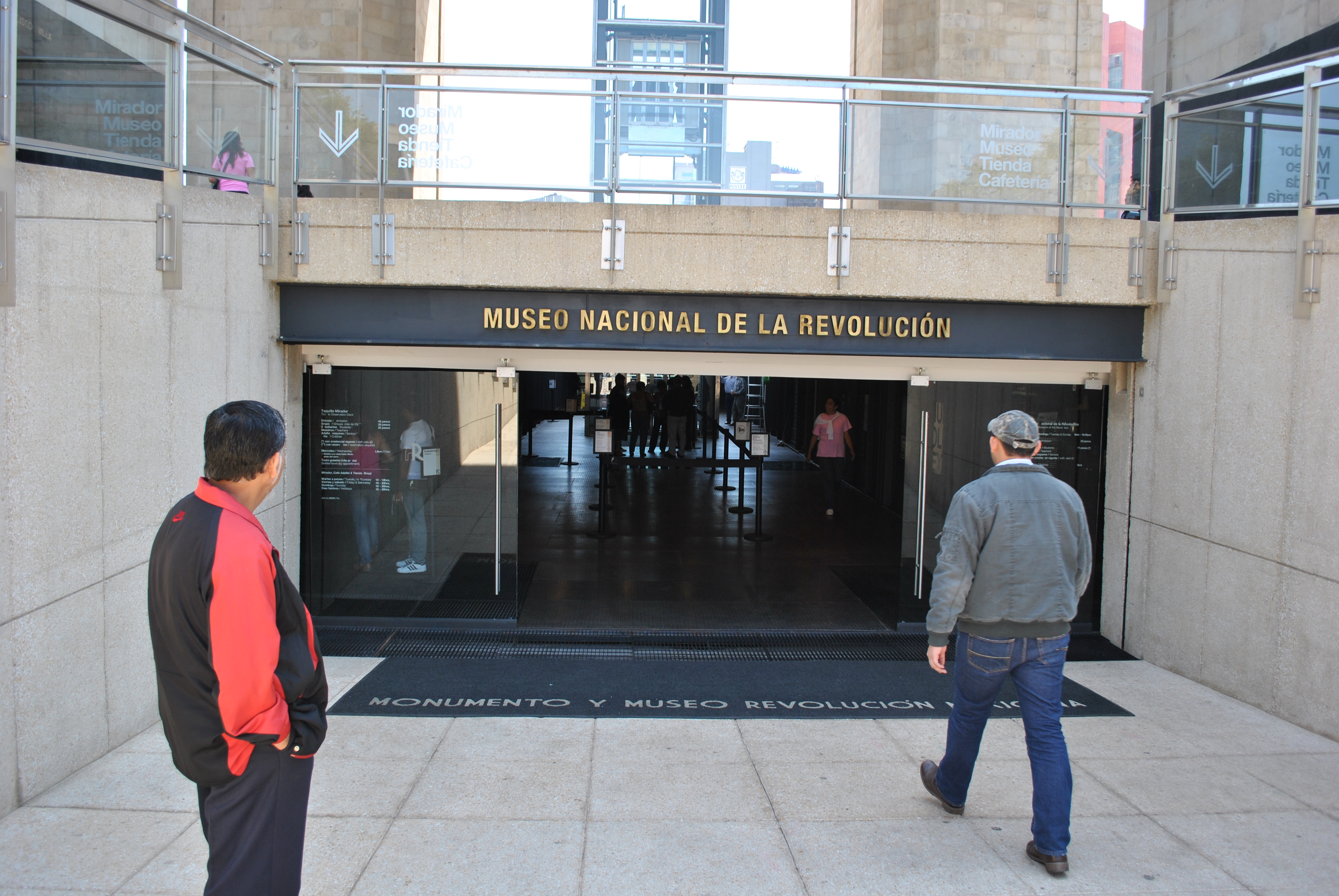 Acceso al museo.